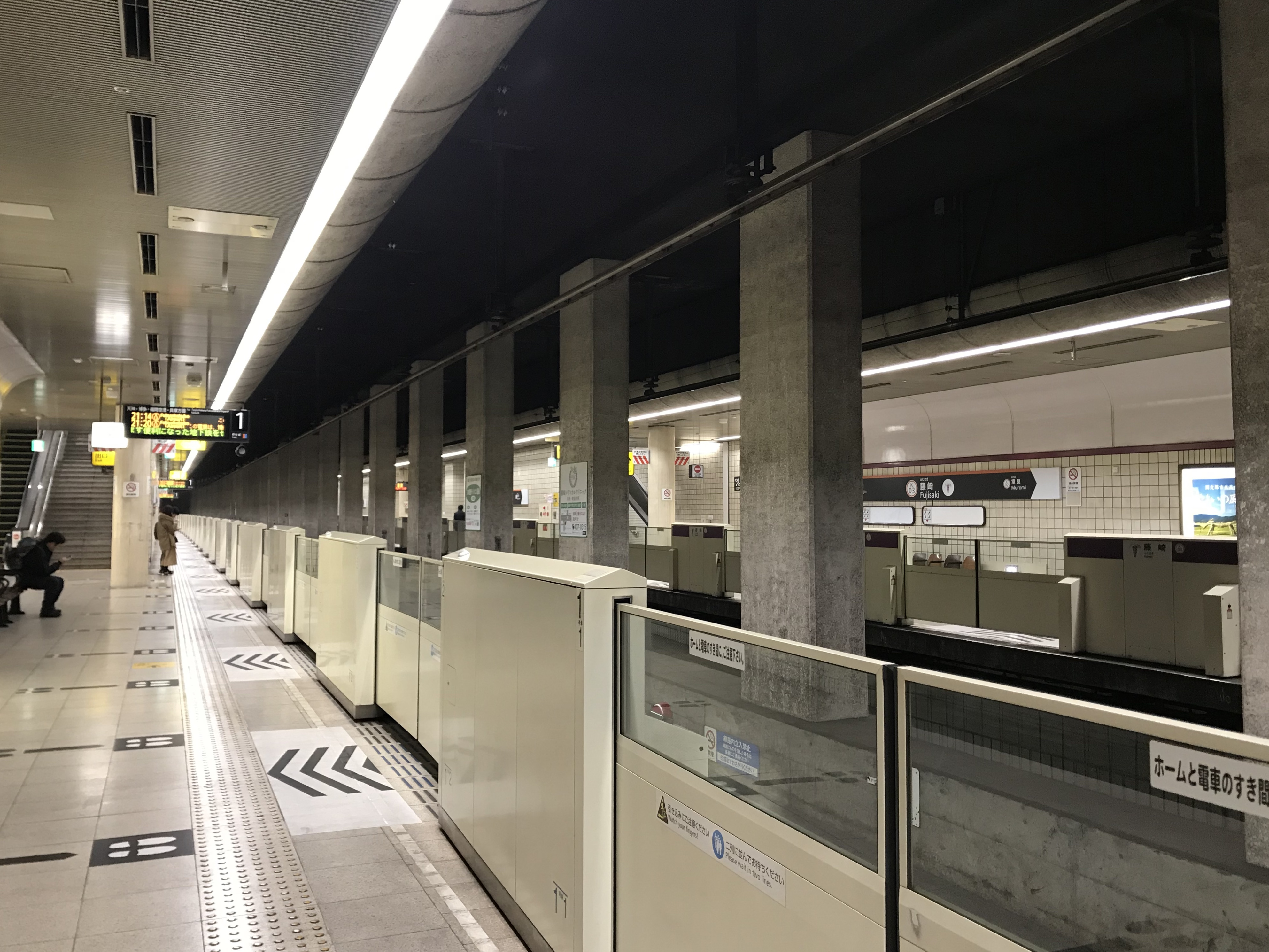 藤崎駅のホーム(奥は西新方面)